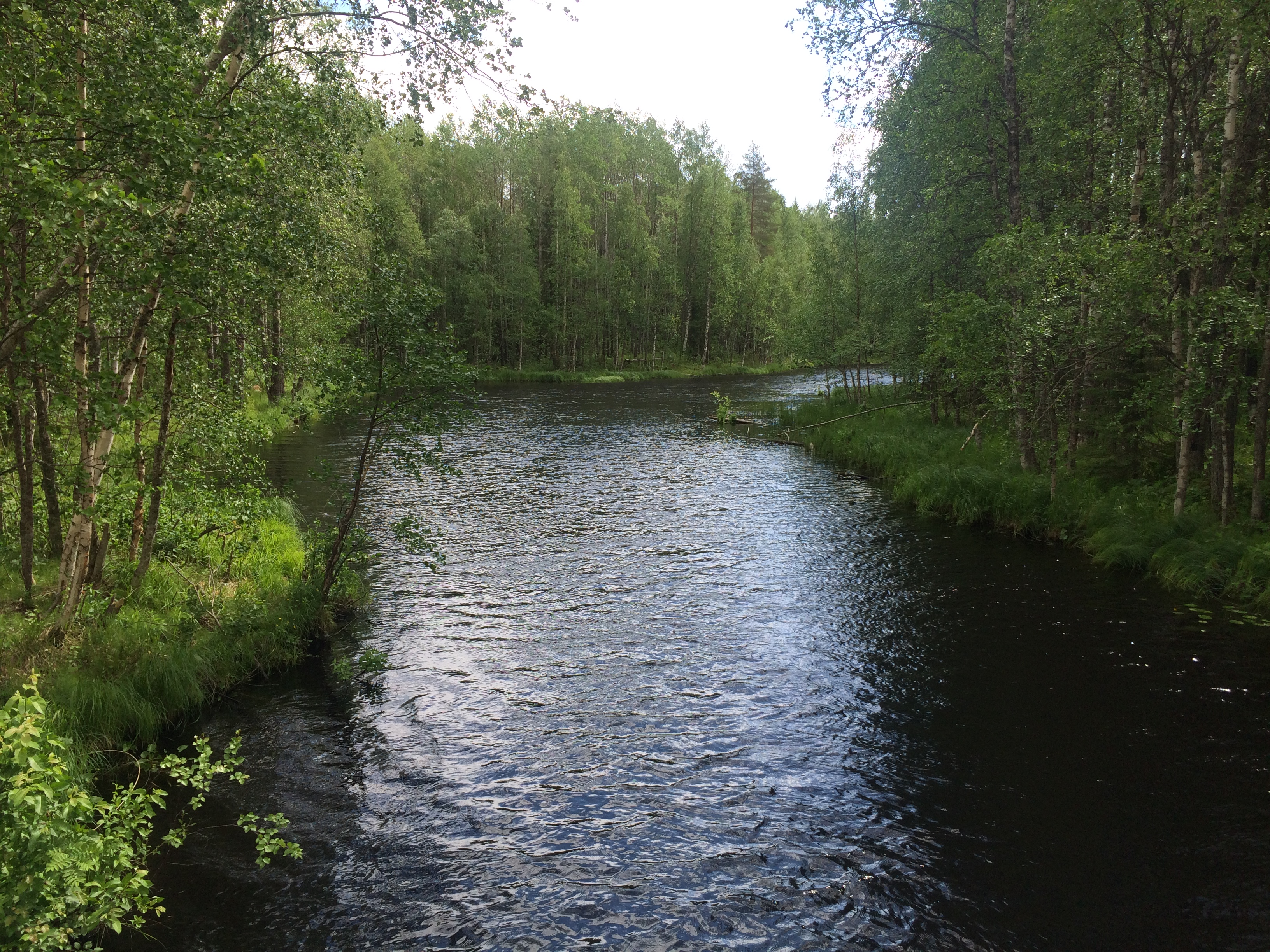 Унежма (река, впадает в Выгозеро)